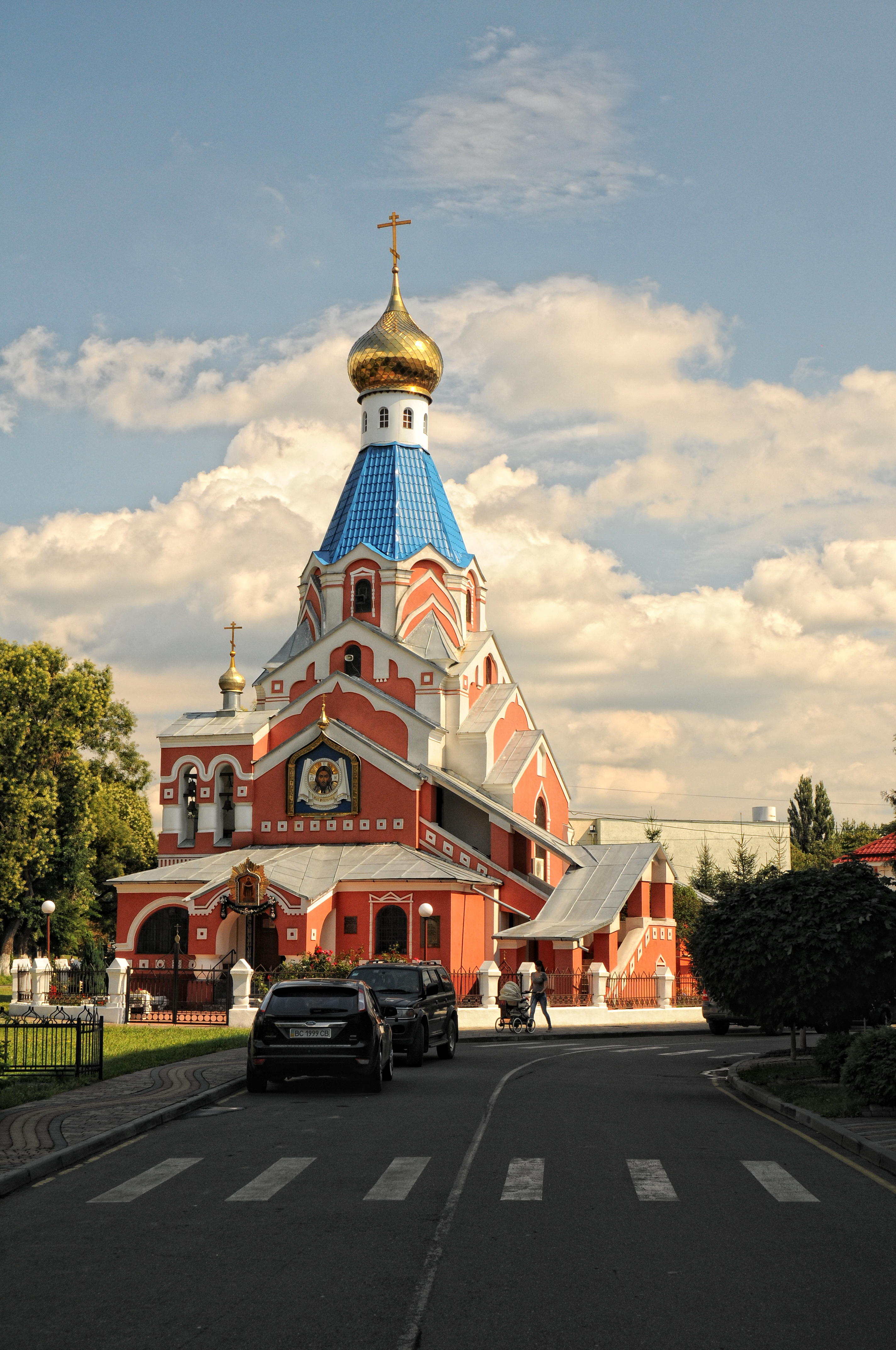 Руська церква